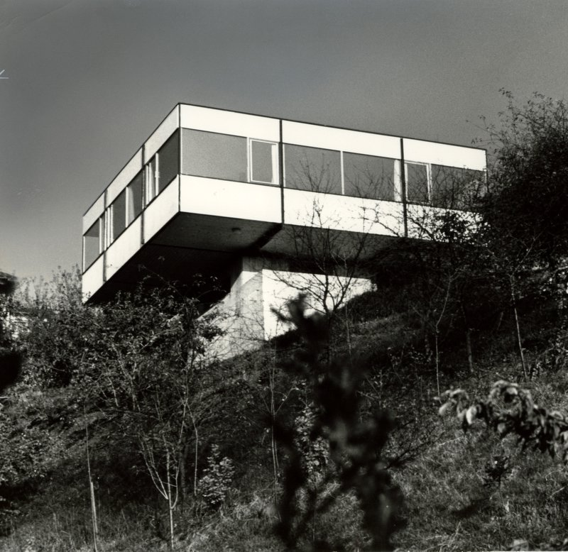 Architektenwohnhaus Landshut 1964 Architekt: Willibald Zeilhofer